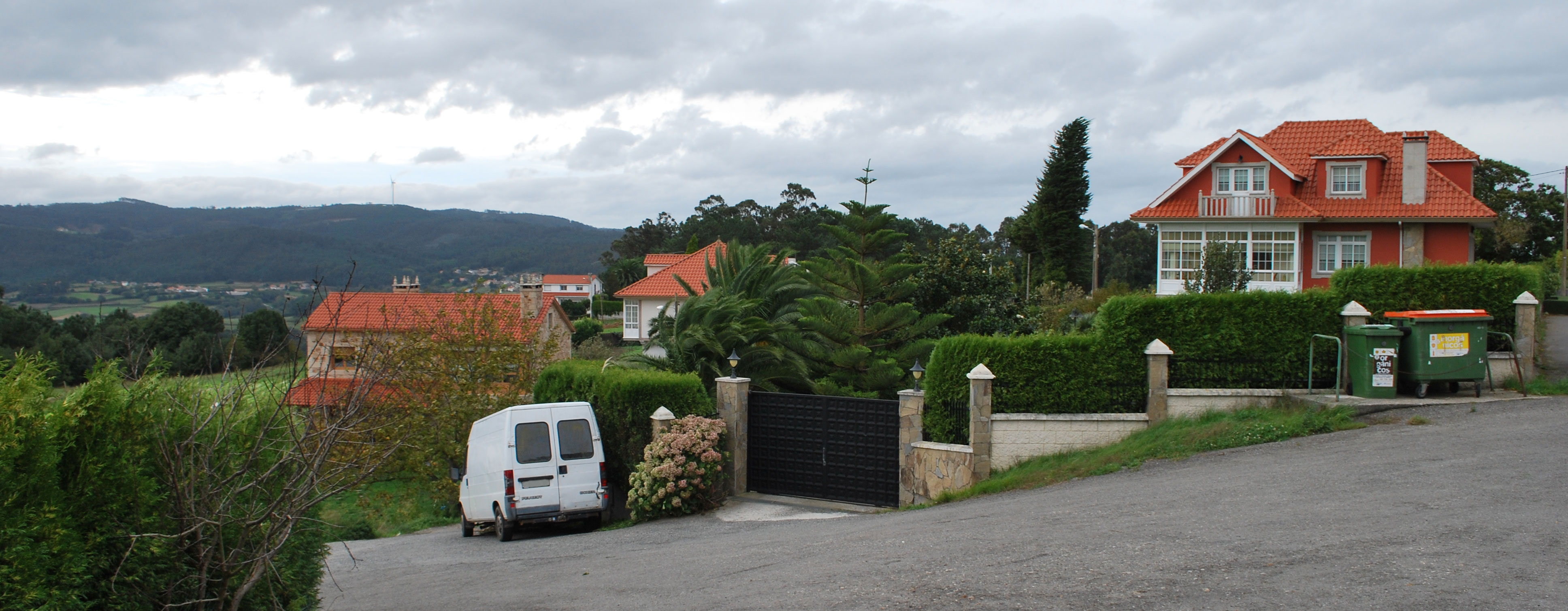 Vista Galo, Barrañán Arteixo ACoruña Galiza